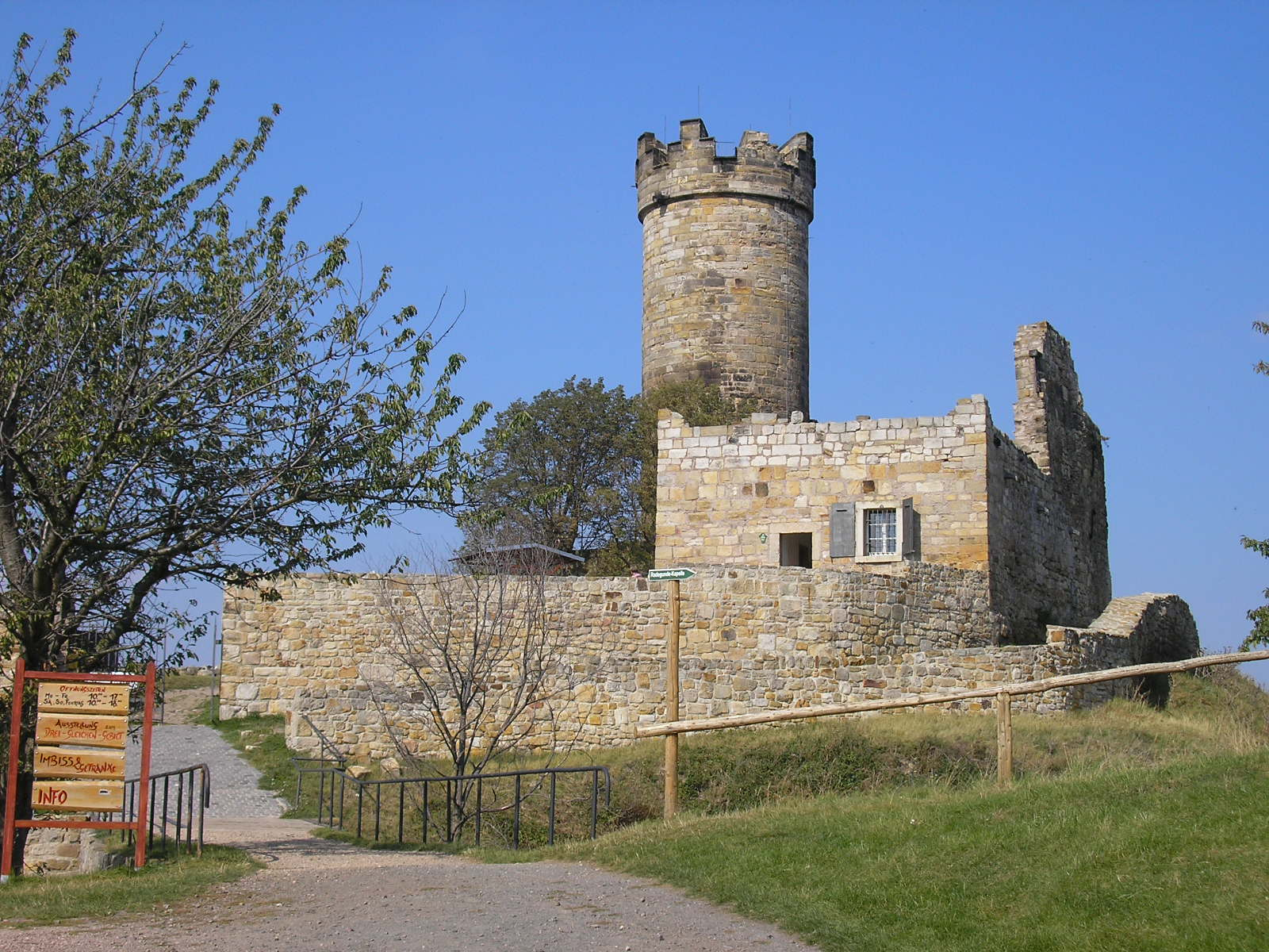 Die Mühlburg bei Mühlberg (Thüringen).